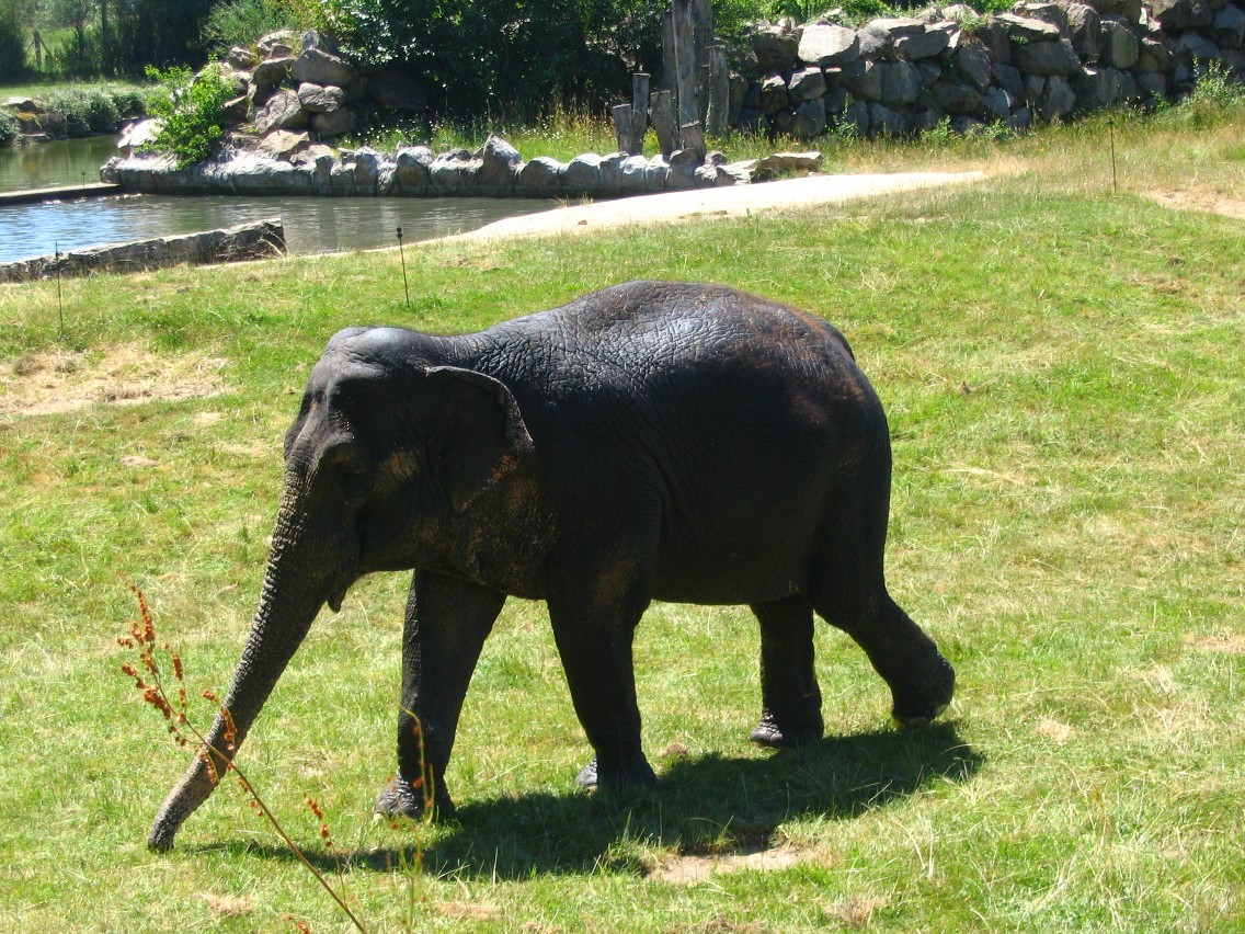 Elephanteau en vadrouille au parc du Pal à Saint-Pourçain sur Besbre, Allier.